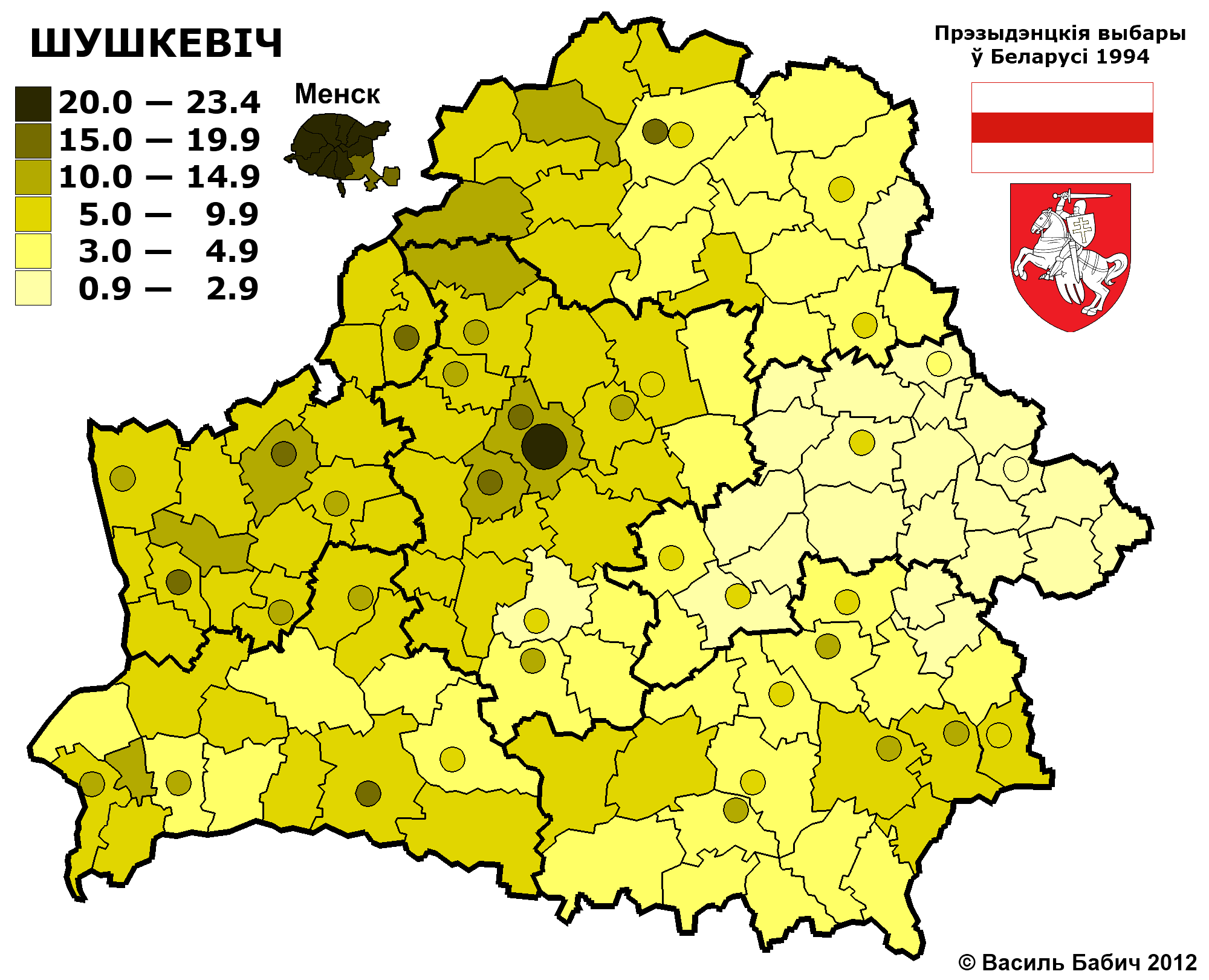 Беларуская (тарашкевіца): Выбары прэзыдэнта Беларусі 1994 року. Першы тур. Станіслаў Шушкевіч.